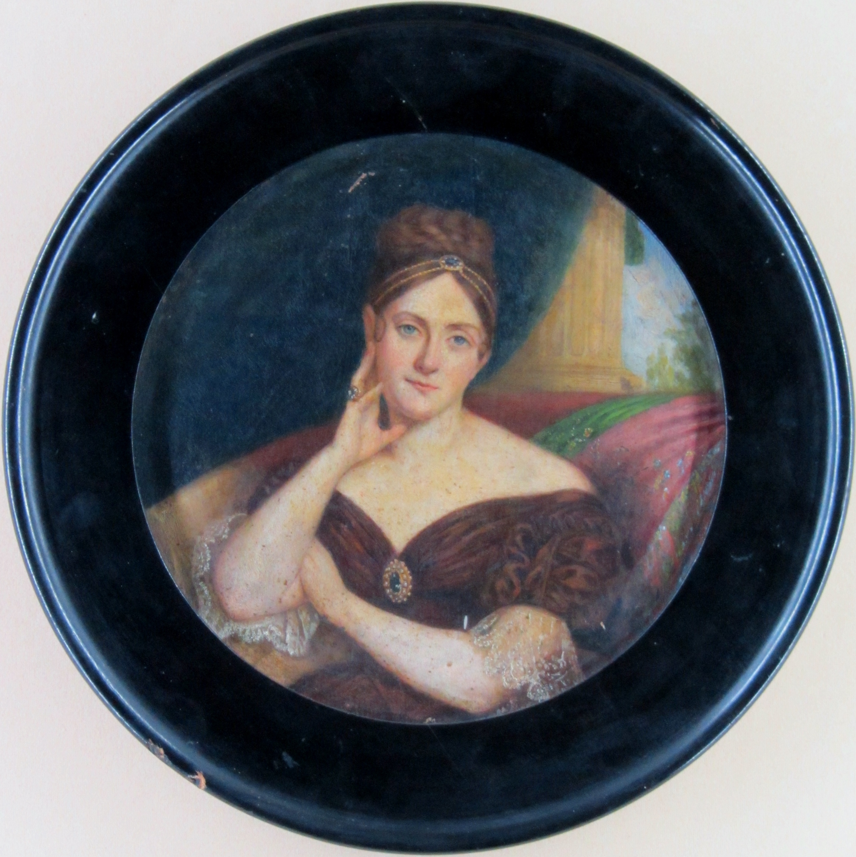 Retrato de Isidora Zegers (Madrid, 1803 - Santiago de Chile, 1869), intérprete y compositora de música de salón